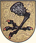 Ehemaliges Wappen der Gemeinde Unterriexingen